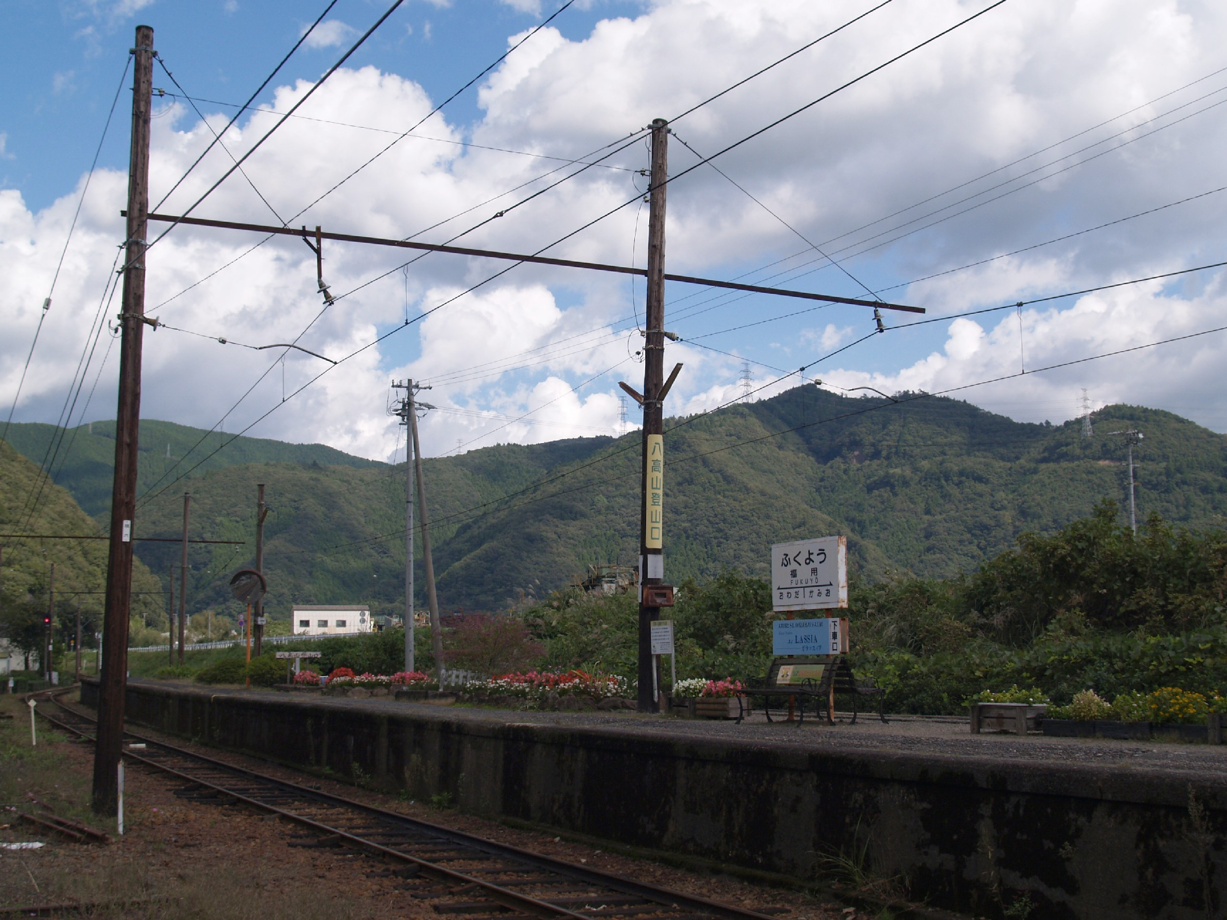 福用駅ホーム